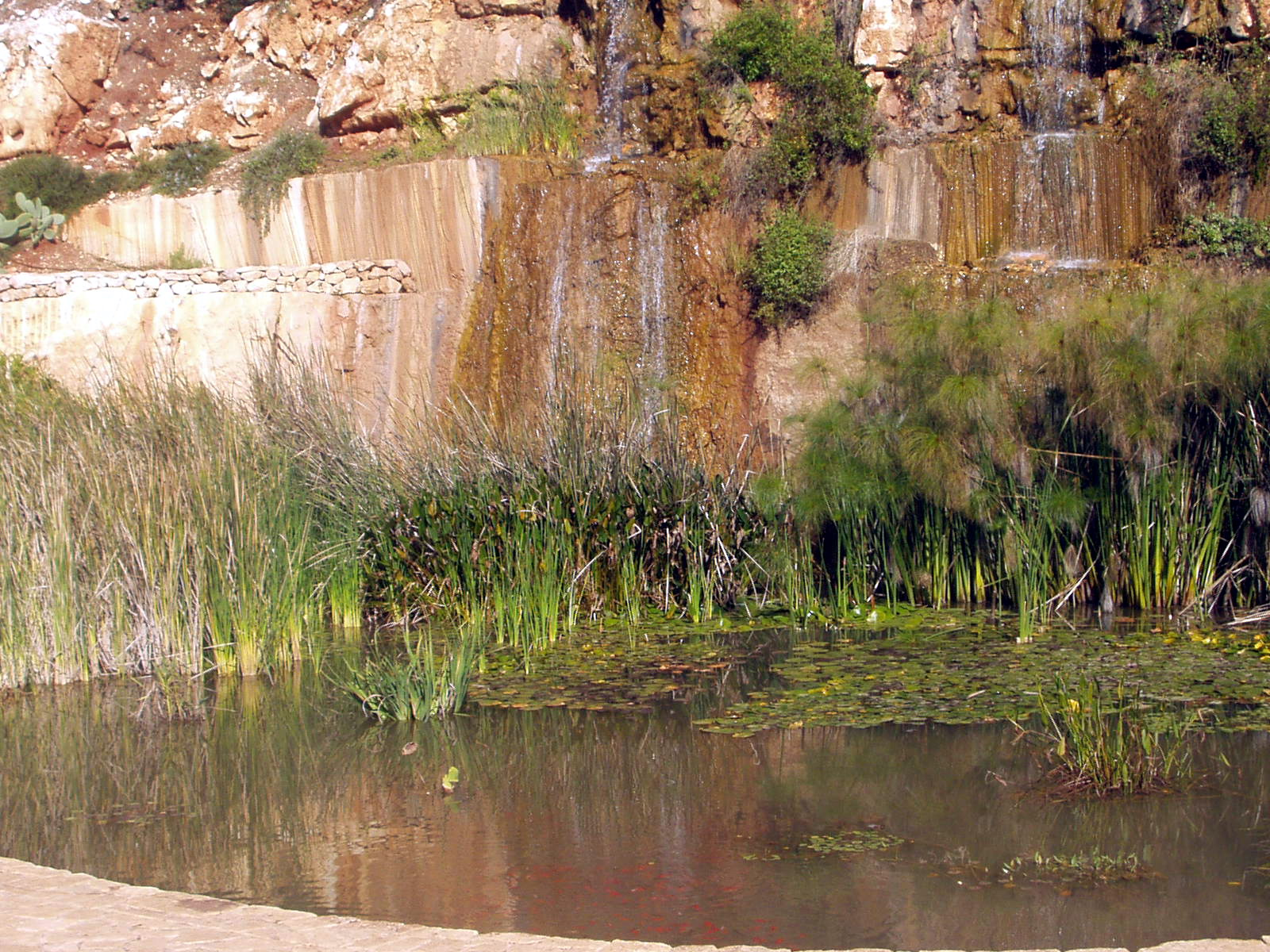 Водоём в парке Агалиль